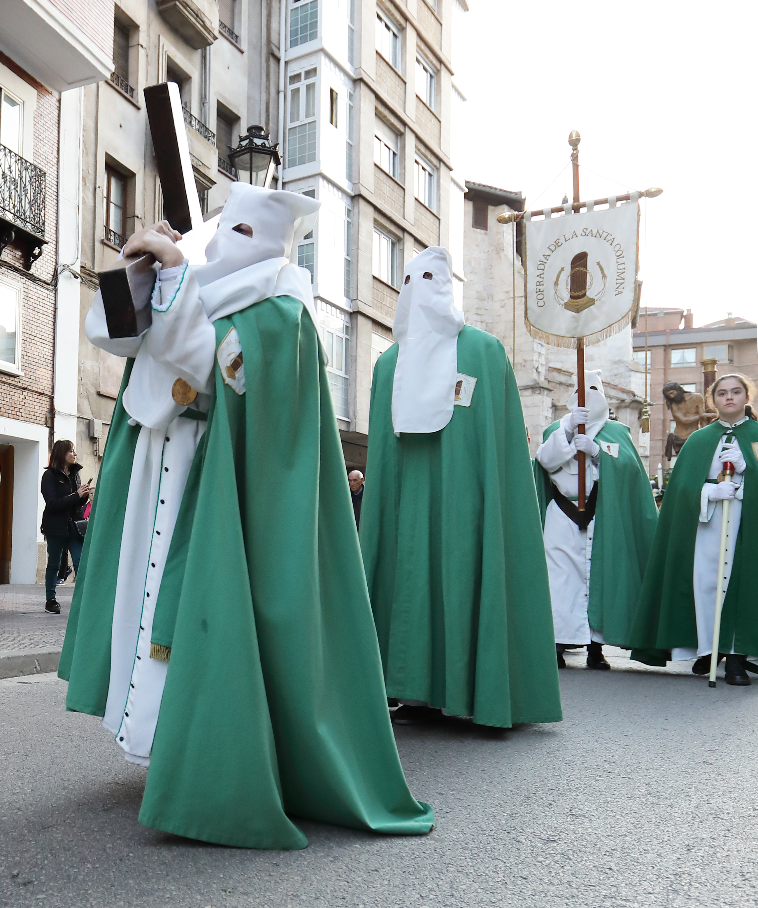 Cofrades de la Cofradía de la Santa Columna del Círculo Católico de Obreros de Burgos en el Rosario Penitencial Obrero (Martes Santo).